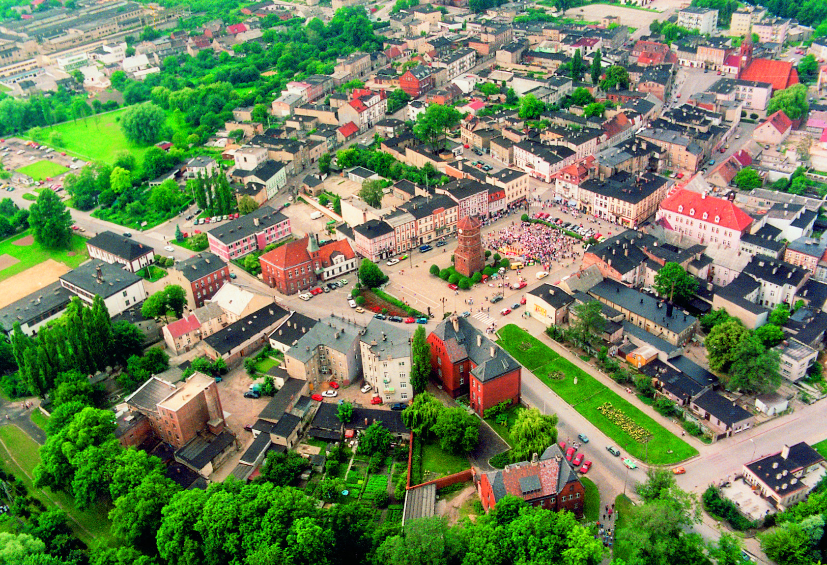 Żnin, rynek z lotu ptaka